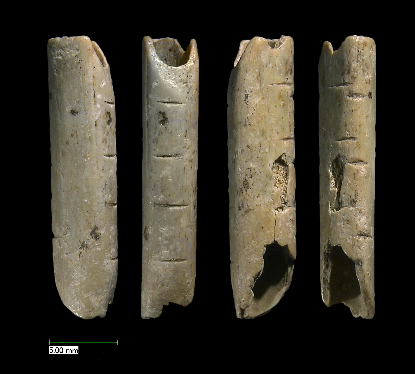 Spiel mir das Lied vom Geier